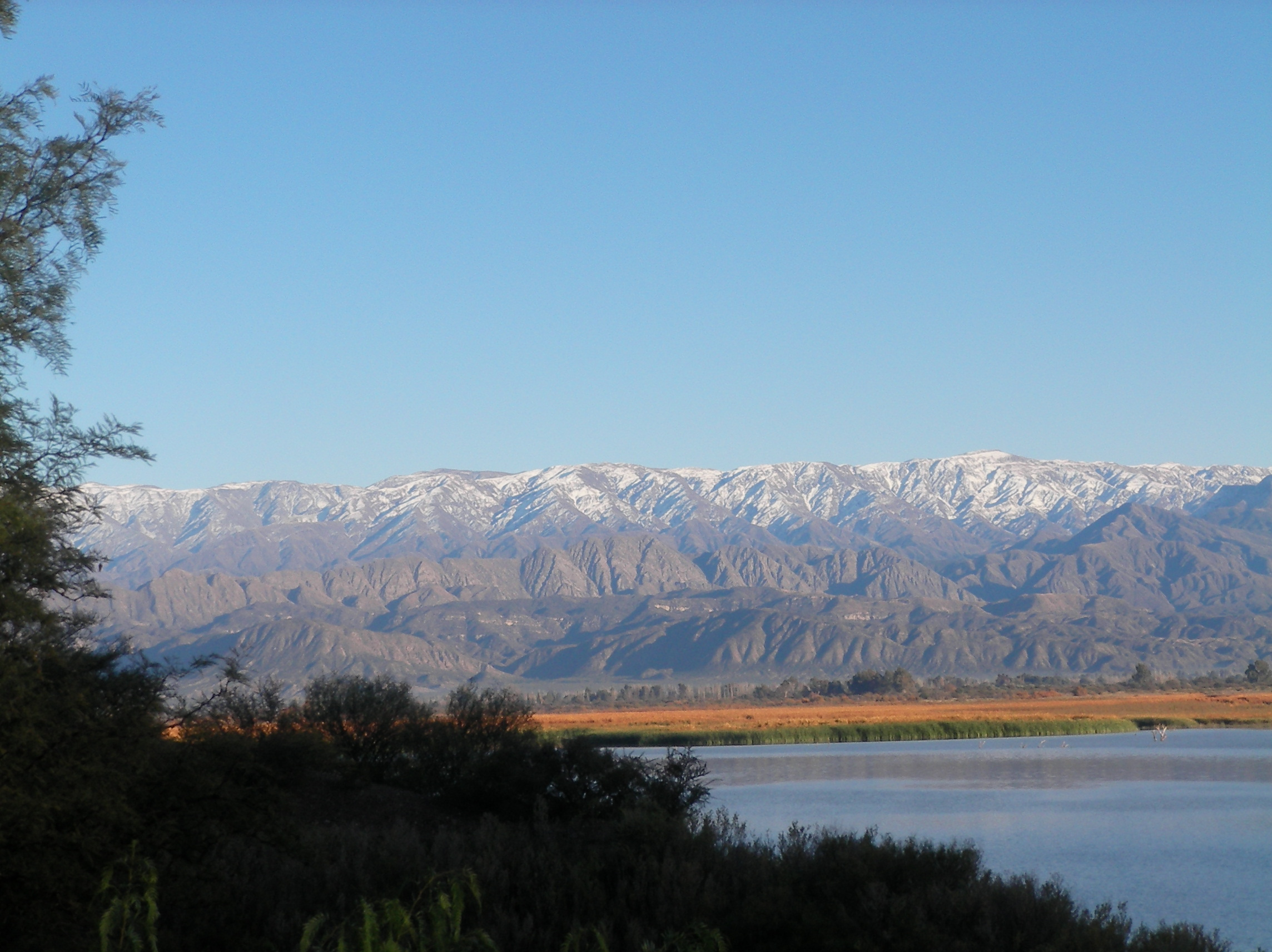 Vista del Embalse Cauquenes, departamento Jáchal, provincia de San Juan, Argentina